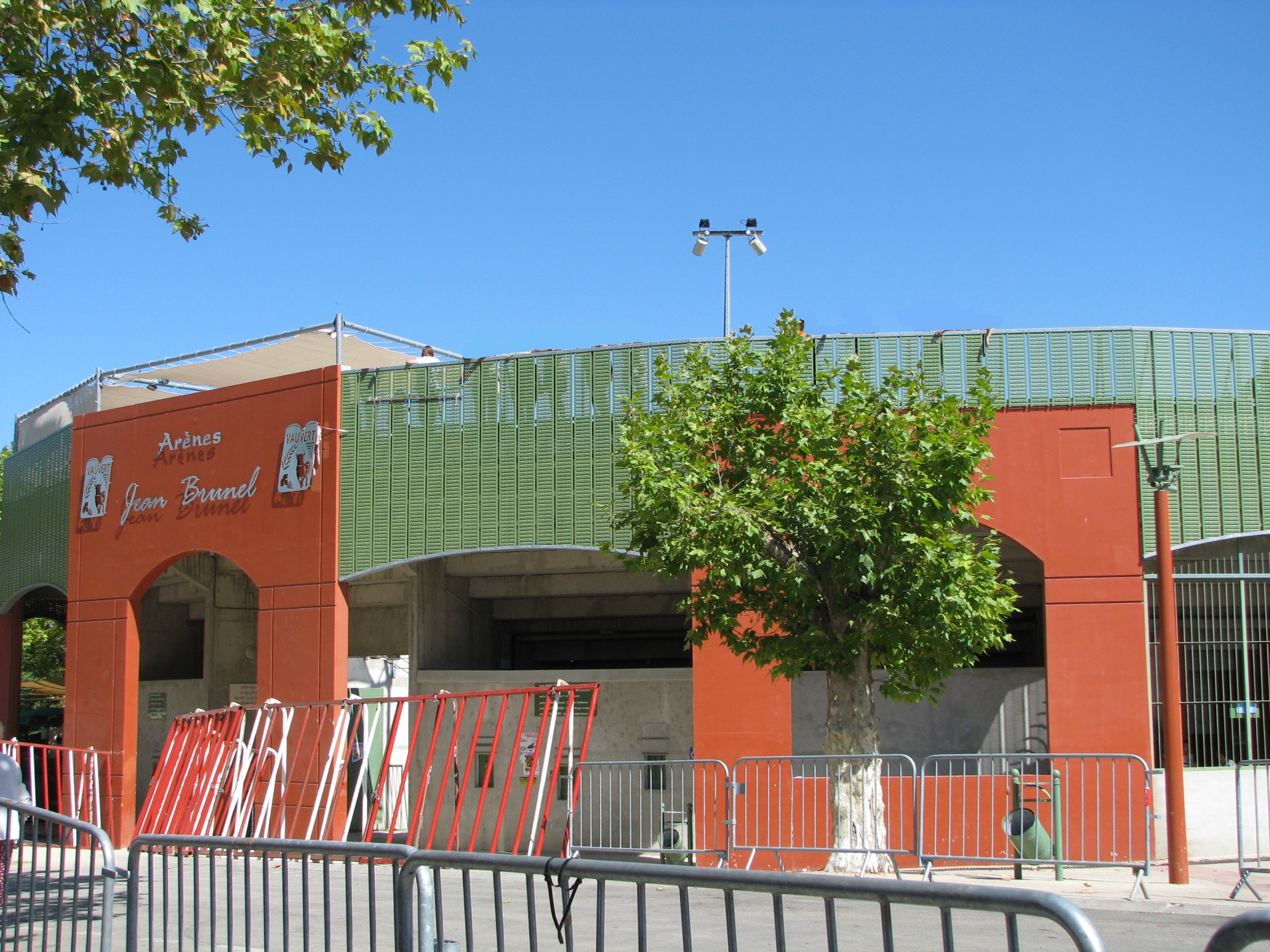 L'entrée des arènes de Vauvert un jour de courses camargaises.